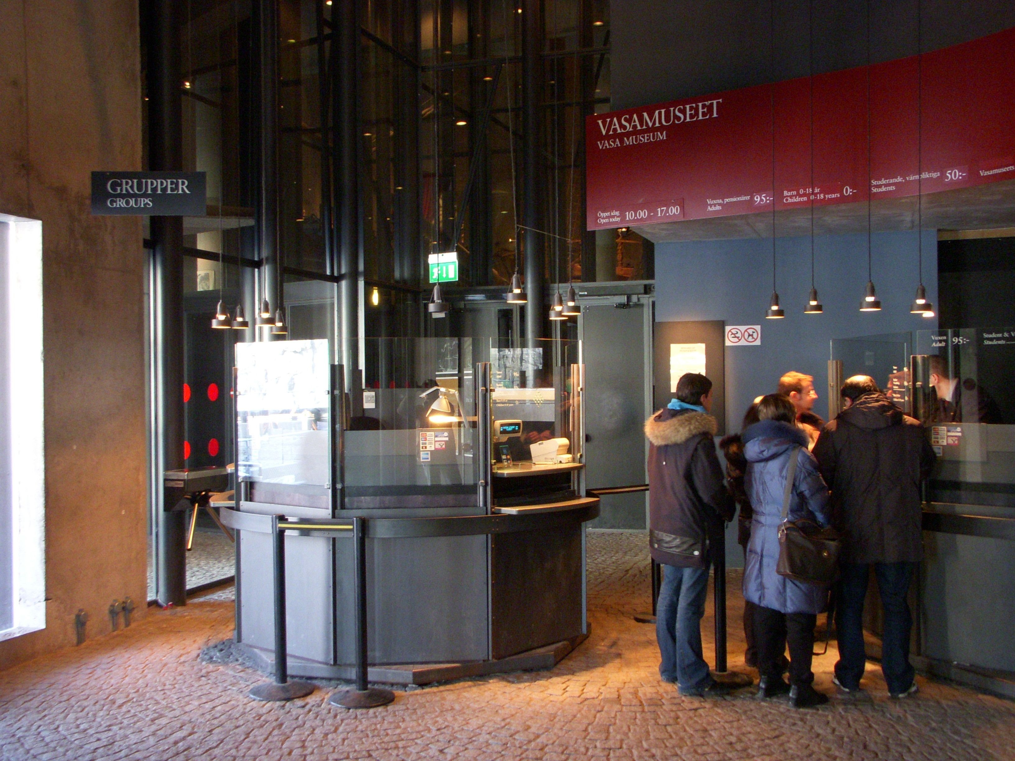 Vasamuseets entréhall